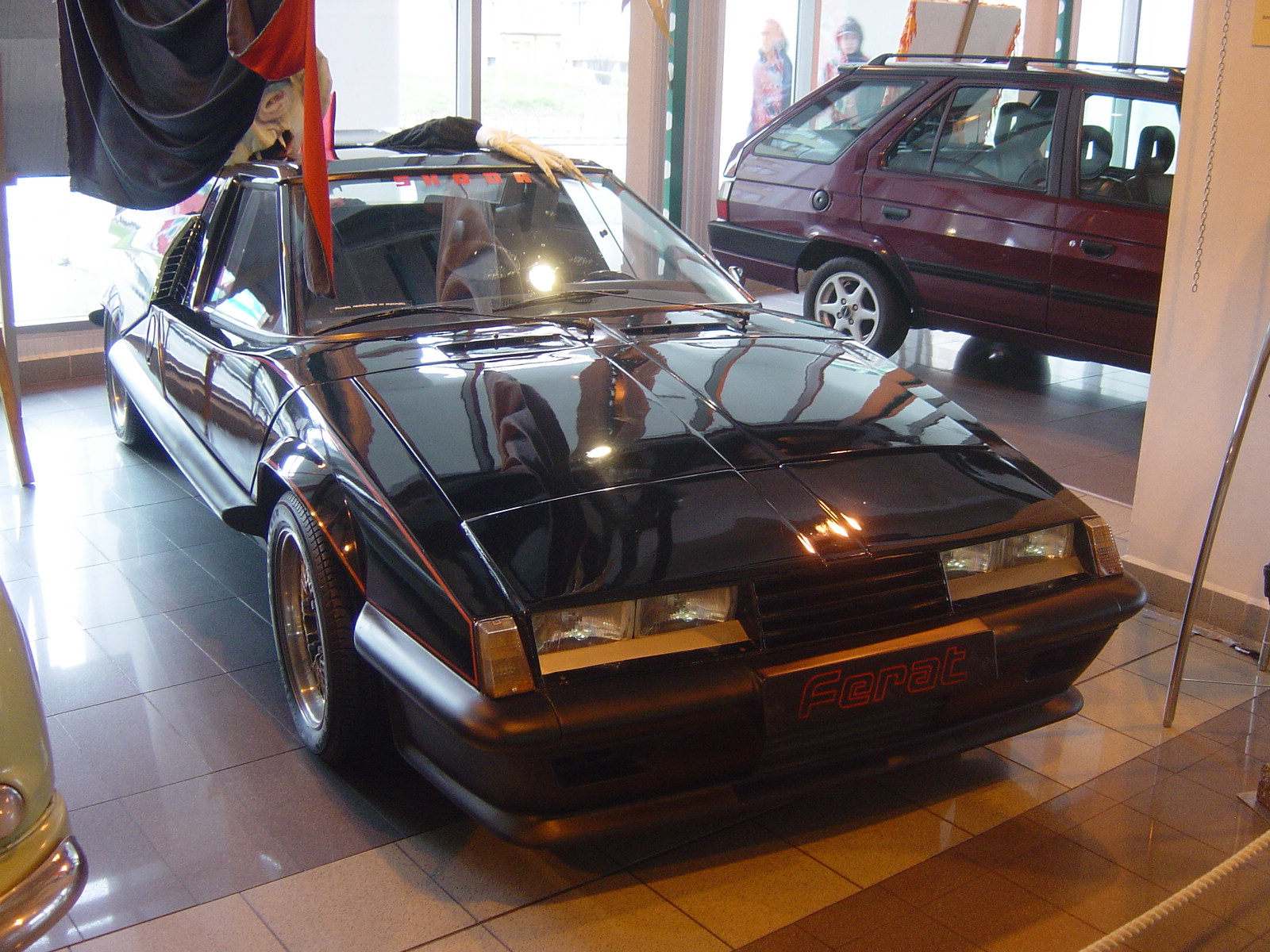 Skoda Ferat